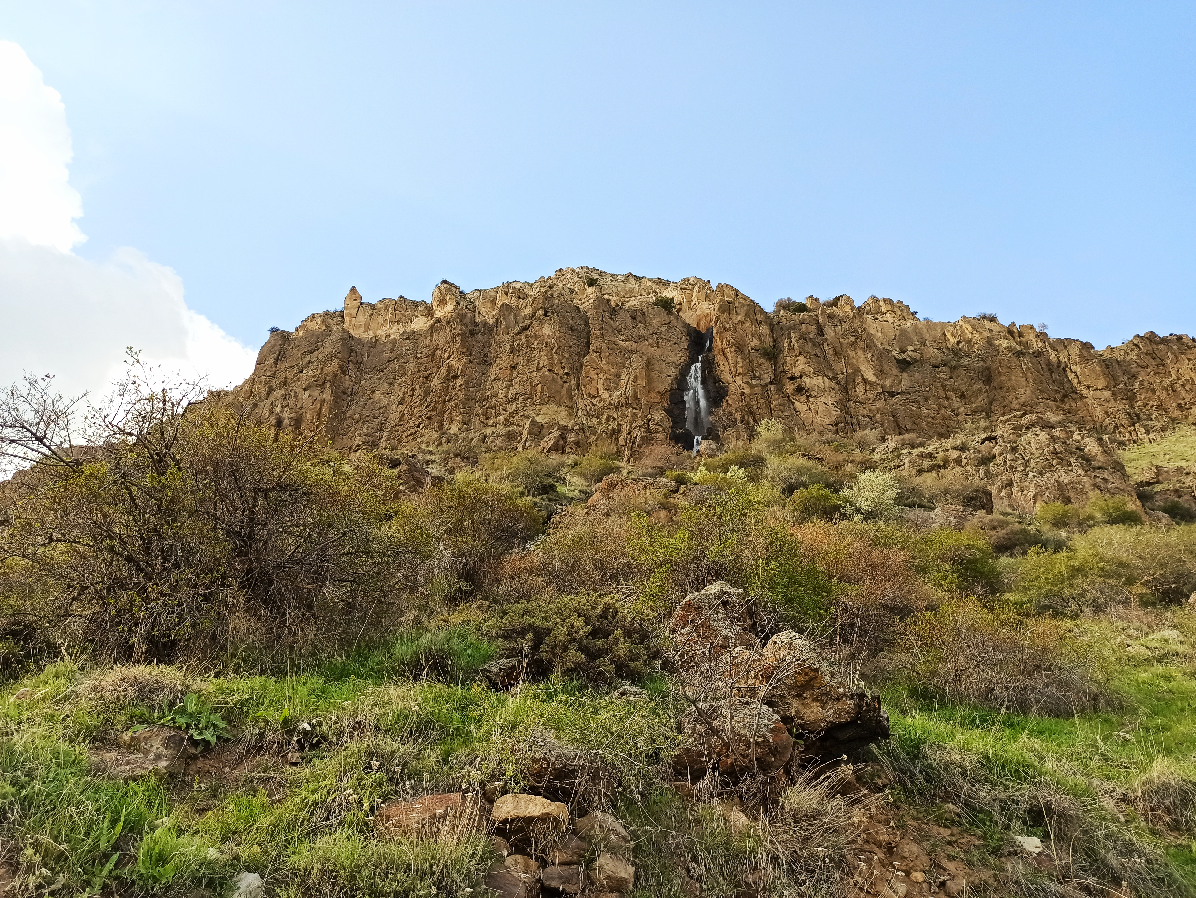 Սպիտակ քար, Ռինդ